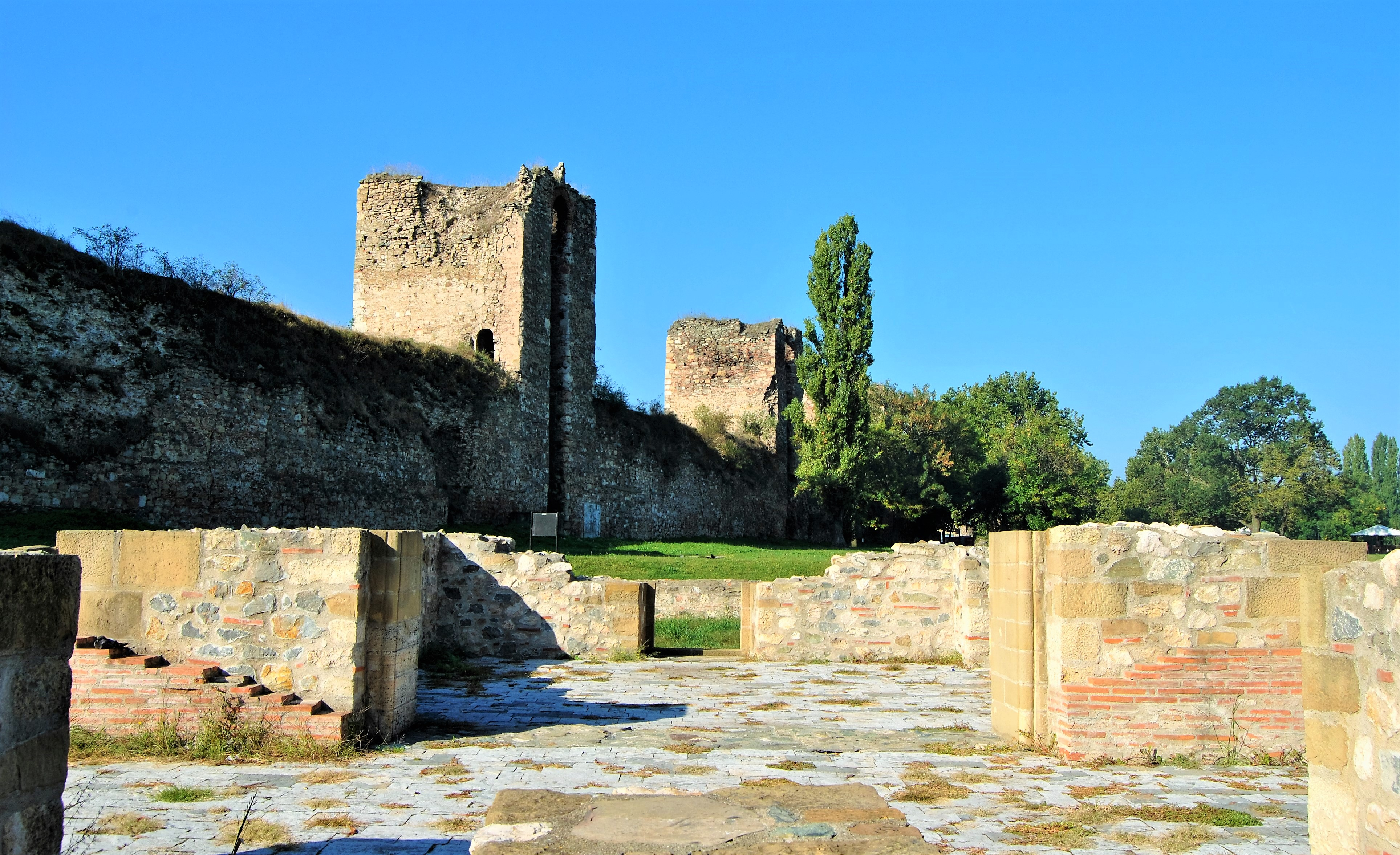 Unutrašnjost crkve u smederevskoj tvrđavi